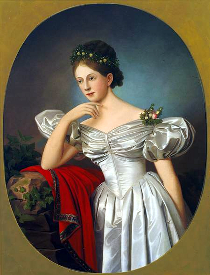 B. Raul: Portrait einer jungen Frau im Brautkleid mit Myrtenkranz vor abendlicher Landschaft. Öl auf Karton. 109 x 82 cm. Signiert „B. Raul“, datiert 1884, Ortsbezeichunng „Frankfurt“